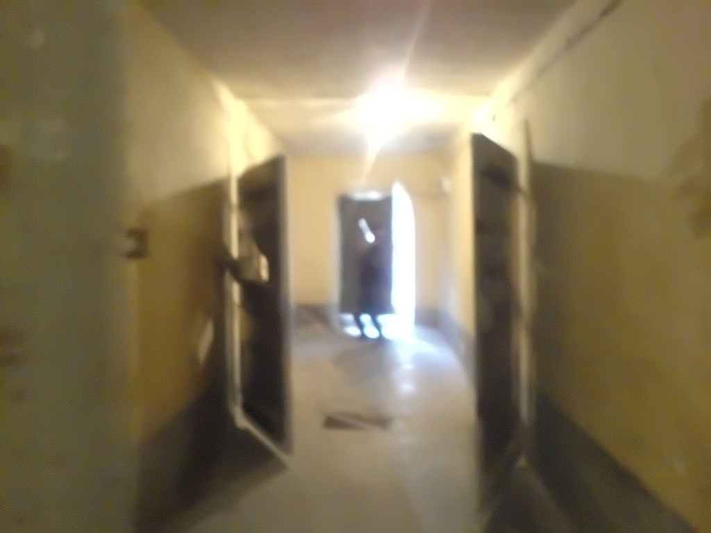 Sinop Cezaevi